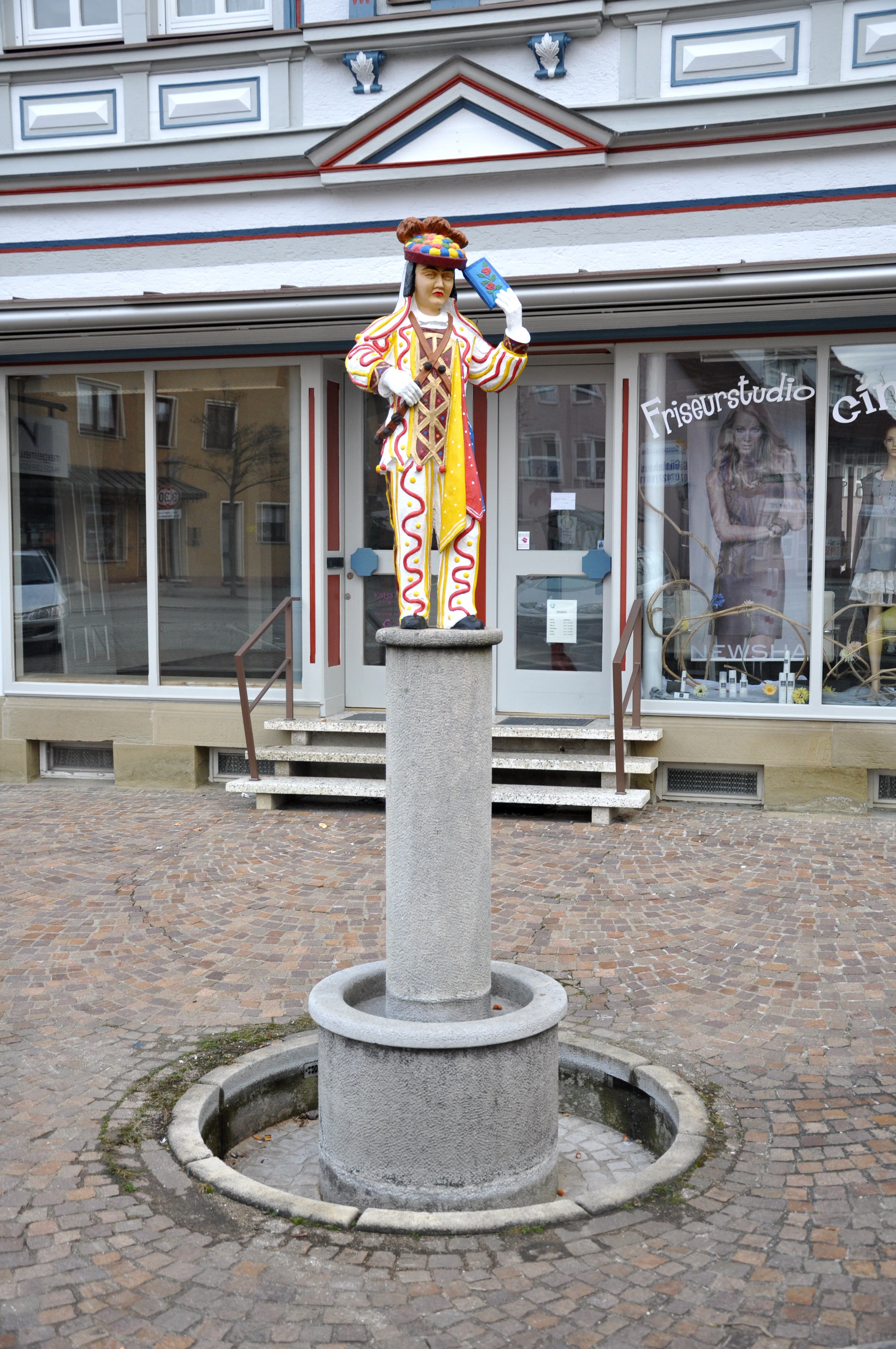 Schömberg (Zollernalbkreis), Narrenbrunnen (mit Metallkopie von 1980 der Holzskulptur von 1964 von Alfred Sessler)